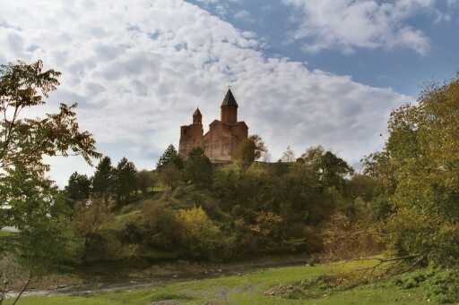 Gremi Kakheti Georgia